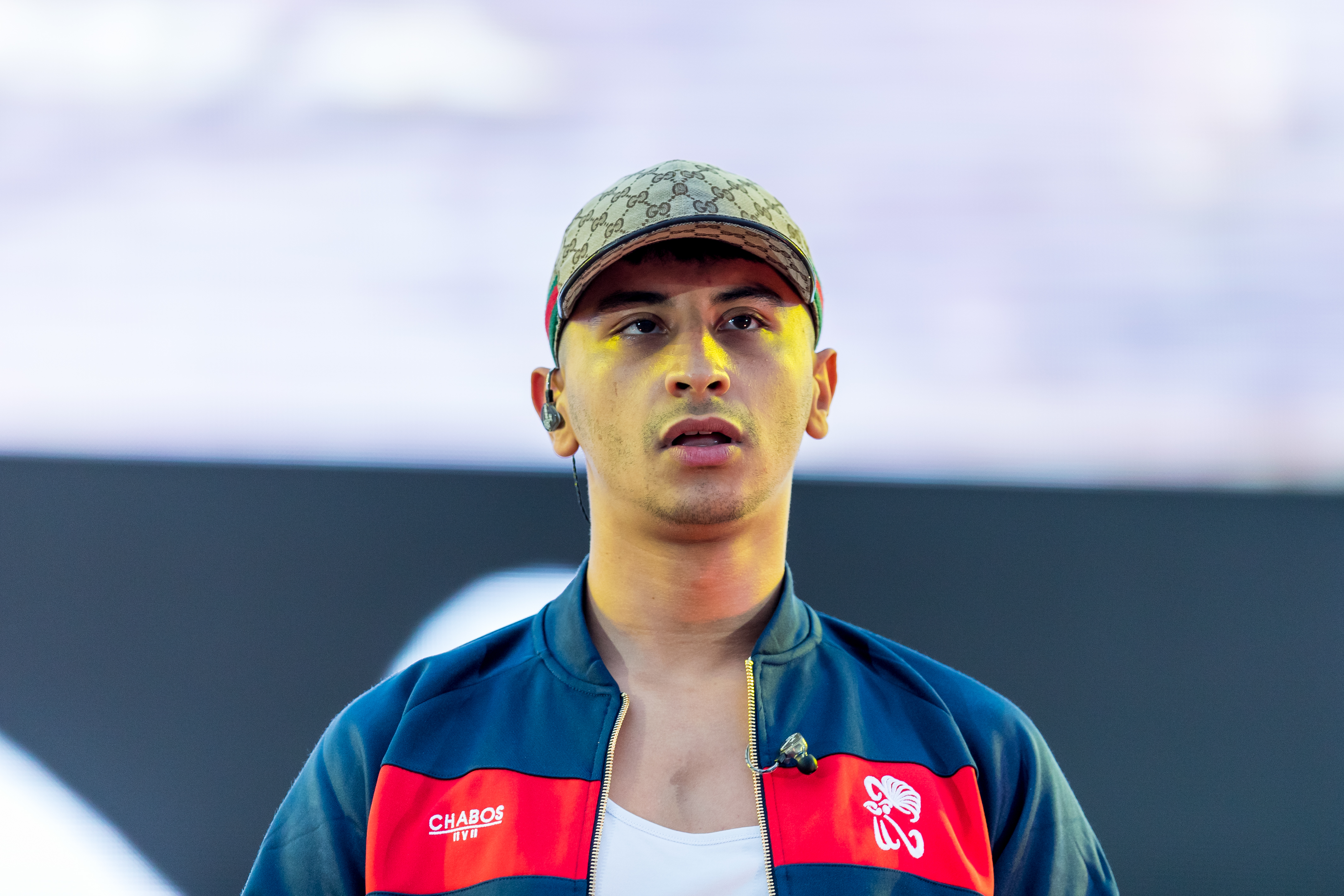 Soufian during CARStival at Maimarktgelände, Mannheim, Baden-Württemberg, Germany on 2020-07-10, Photo: Sven Mandel Promotion: go7.ag